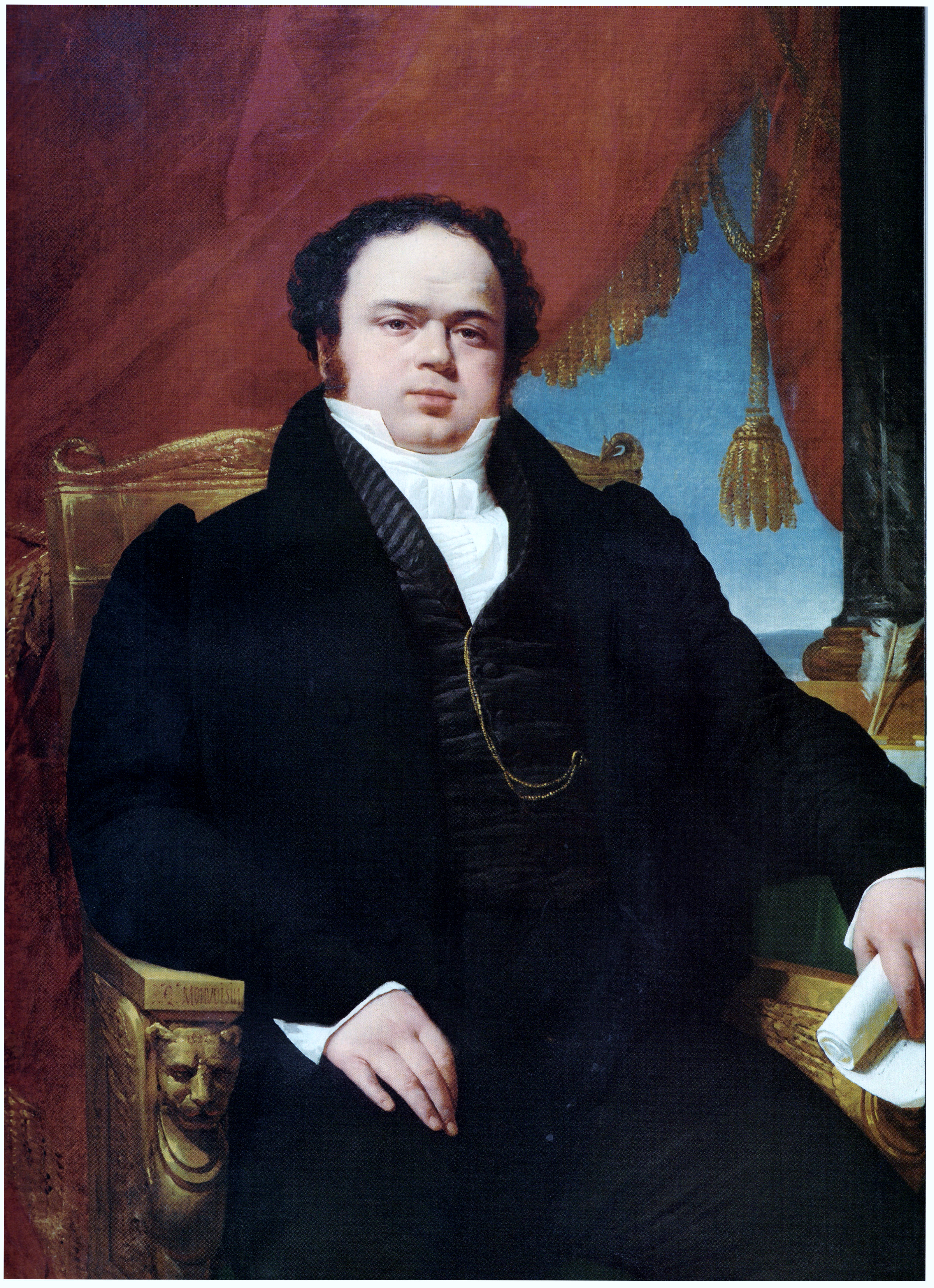 Retrato del chileno Mariano Egaña realizado en París en 1827. Egaña fue el principal redactor de la Constitución de Chile de 1833